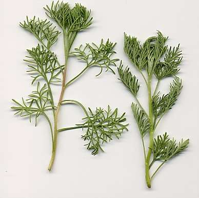 Sidrunpuju lehed